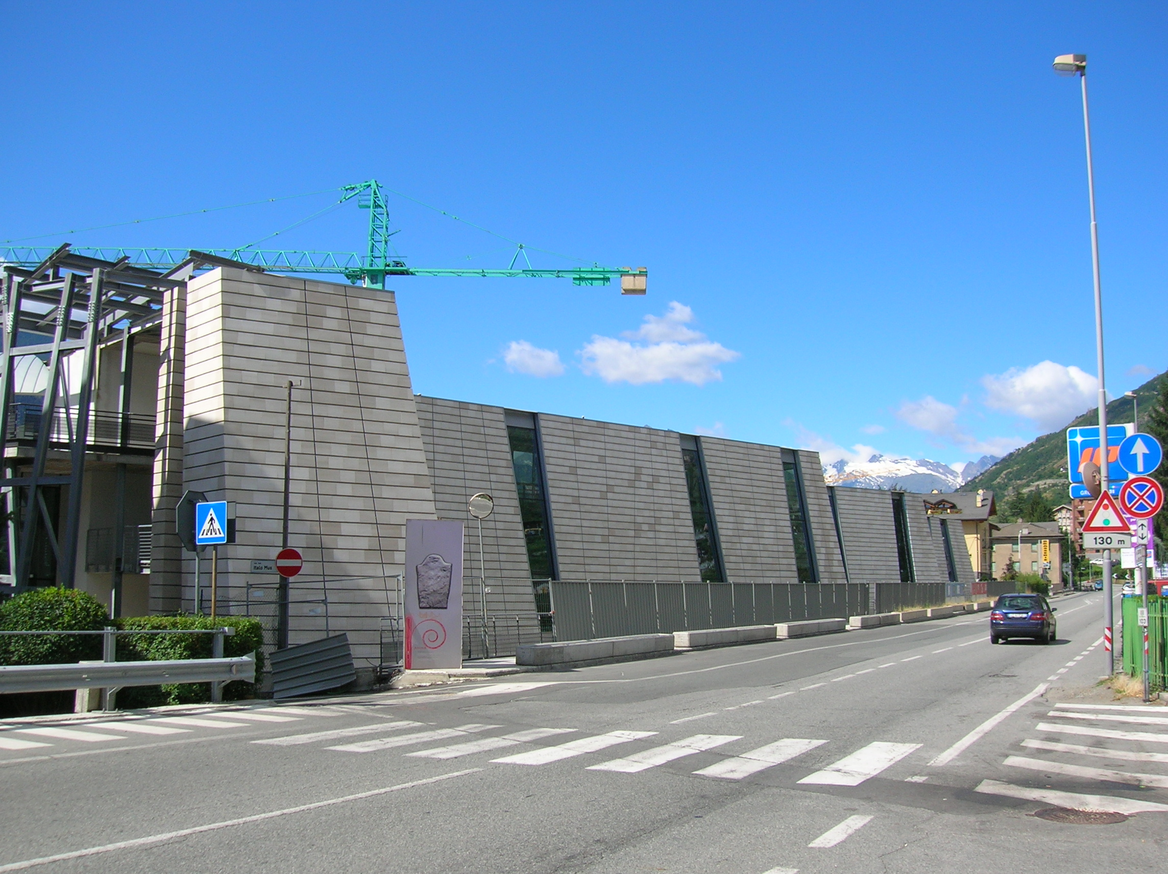 Area megalitica di Saint-Martin-de-Corléans, Aosta, Valle d'Aosta, Italia.